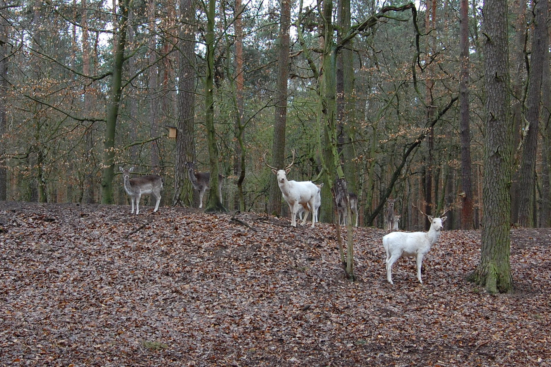 Damwildanlage am Forsthaus Barsberge